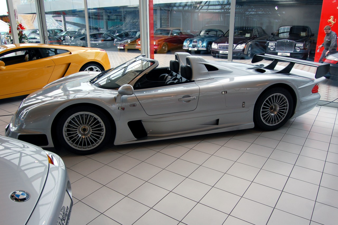 Mercedes Benz CLK GTR Roadster #3 of 5Mercedes Benz CLK-GTR AMG